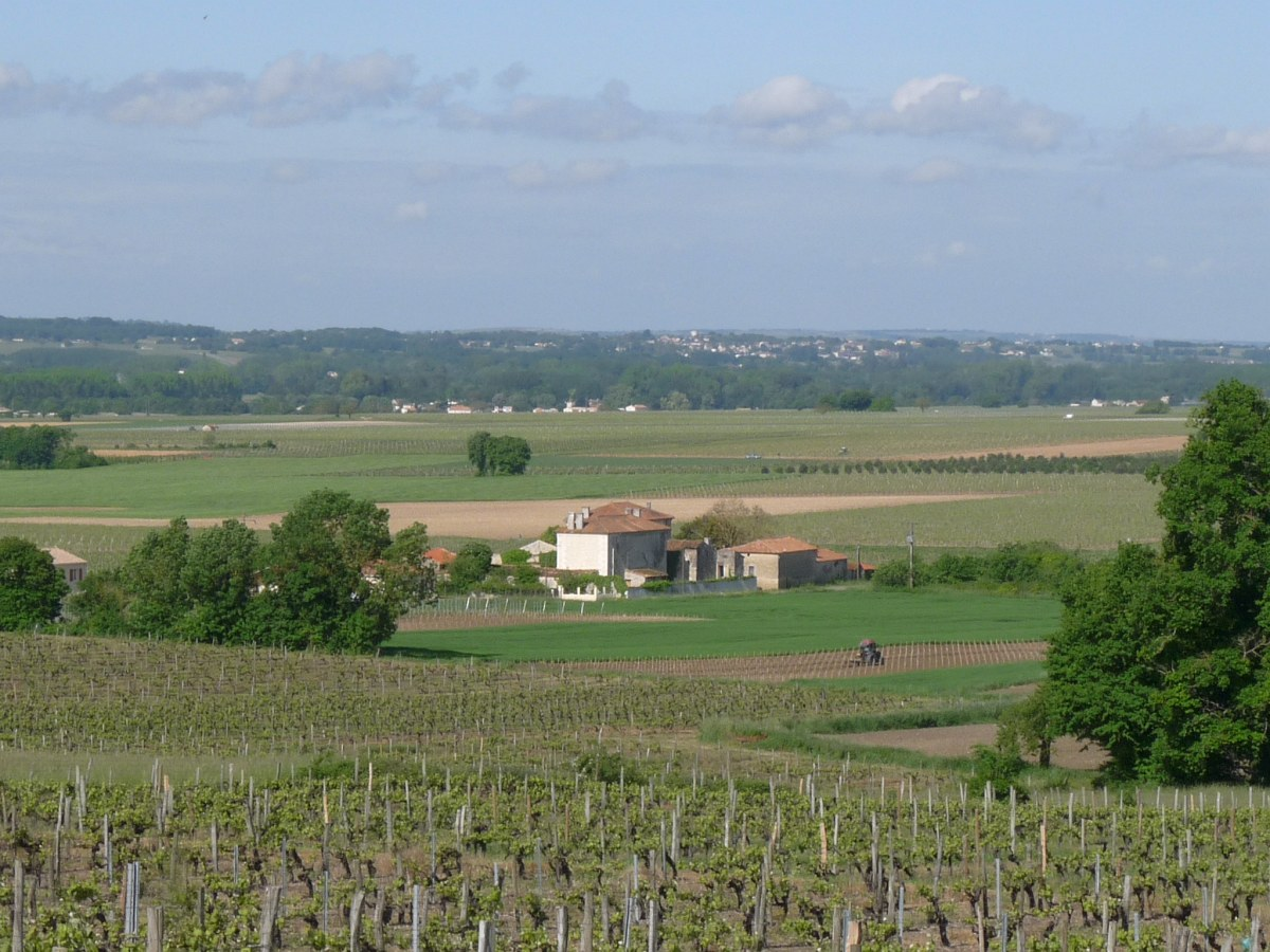 Vue depuis Moulidars, Charente, France